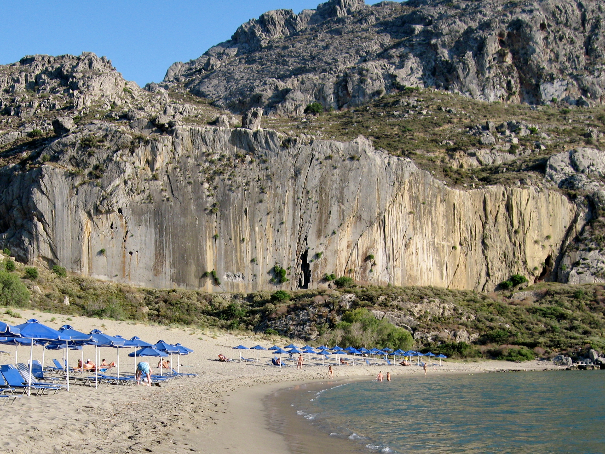 Strand von Plakias, Gemeinde Agios Vasilios, Regionalbezirk Rethymno, Kreta, Griechenland